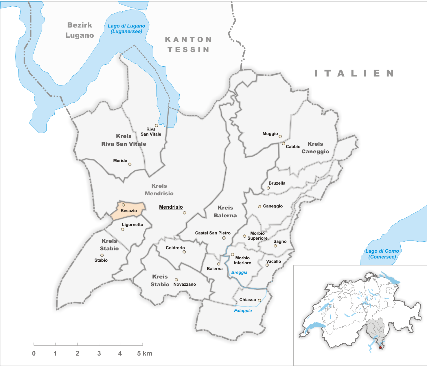 Municipality Besazio Artist: Tschubby